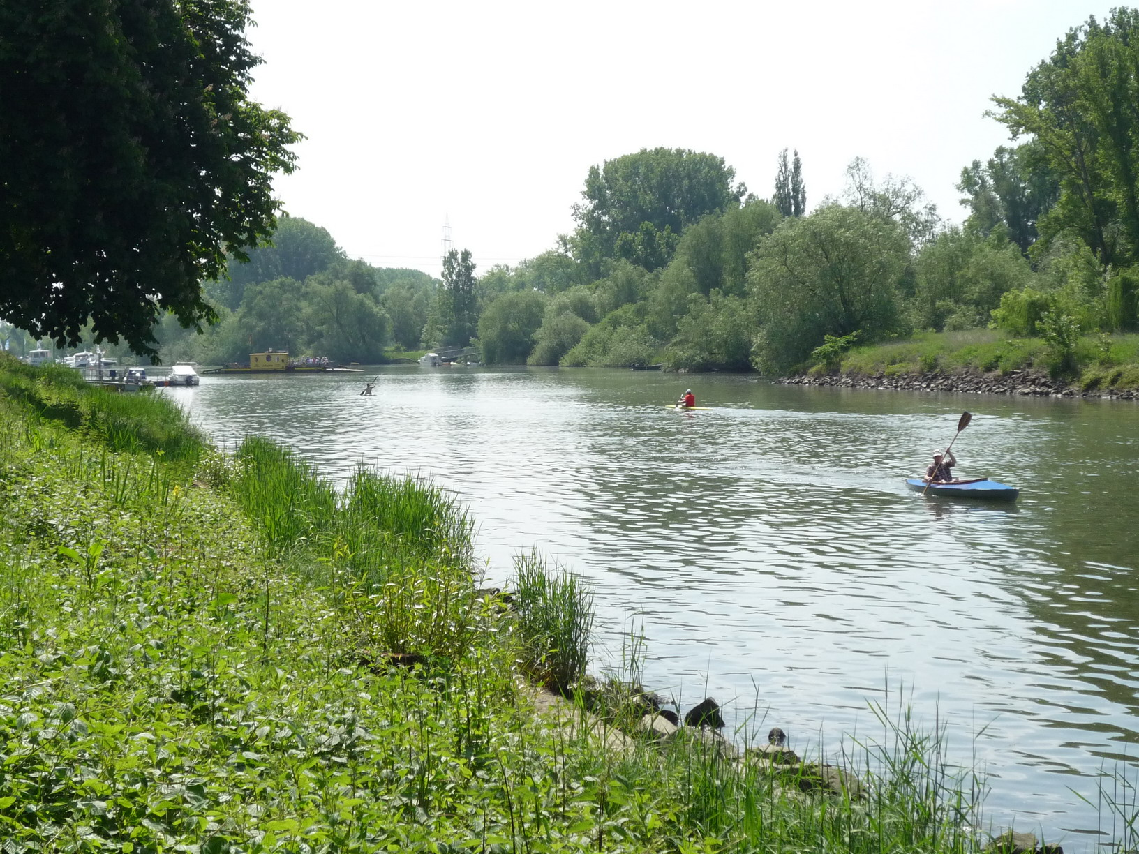 Hessisches Ried, Altrheinarm zwischen Ginsheim und der Altrheininsel Nonnenau. Im Hintergrund ist die Fähre "Johanna" zu sehen.